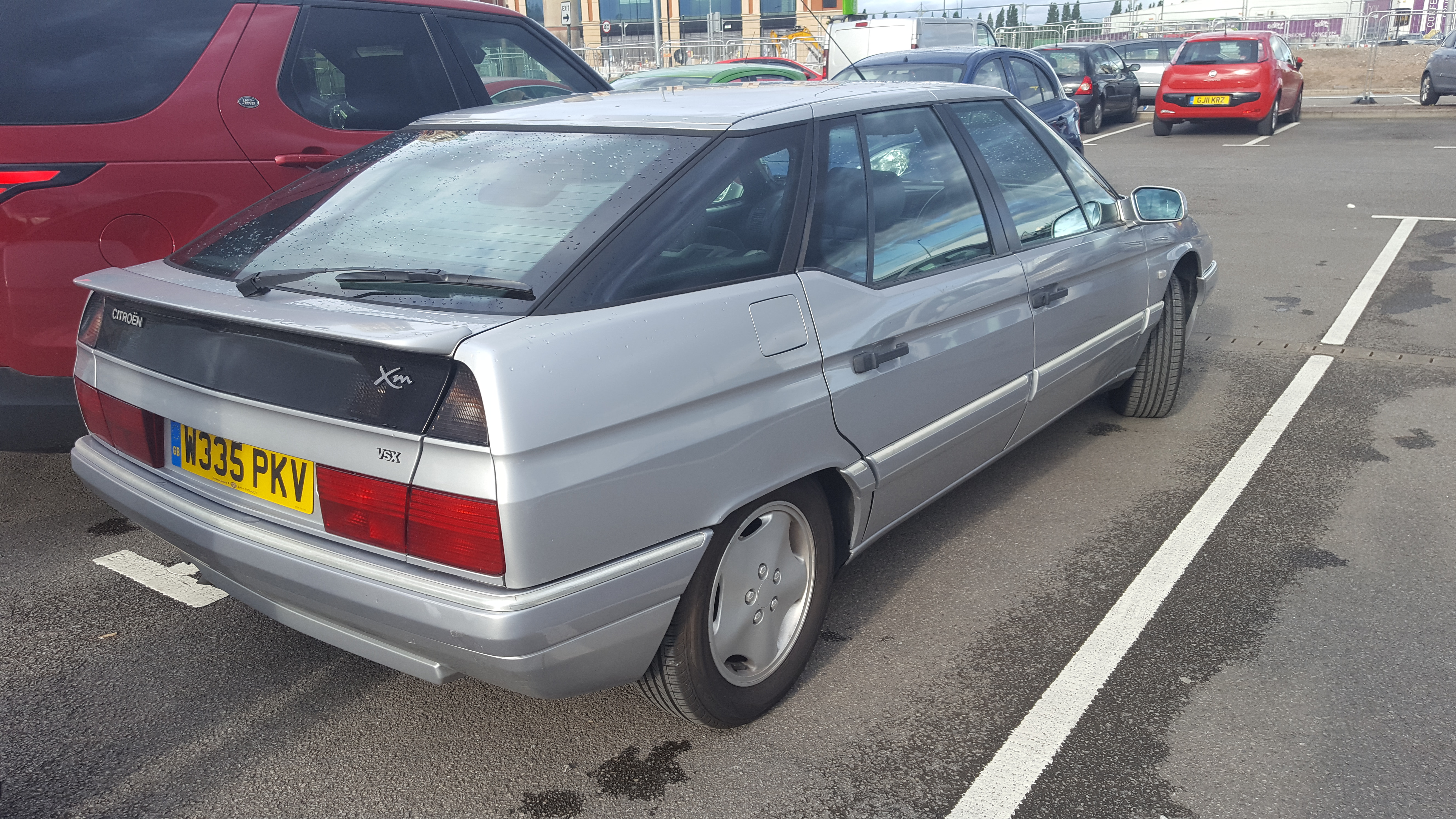 2000 Citroen XM 2.1 TD VSX Auto